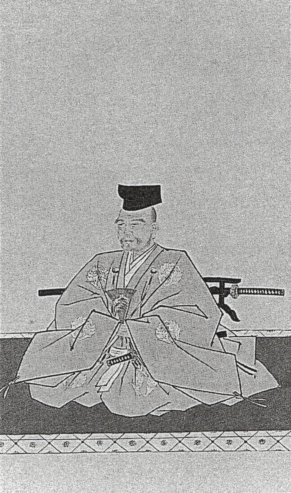 鍋島直温の肖像(モノクロ)。